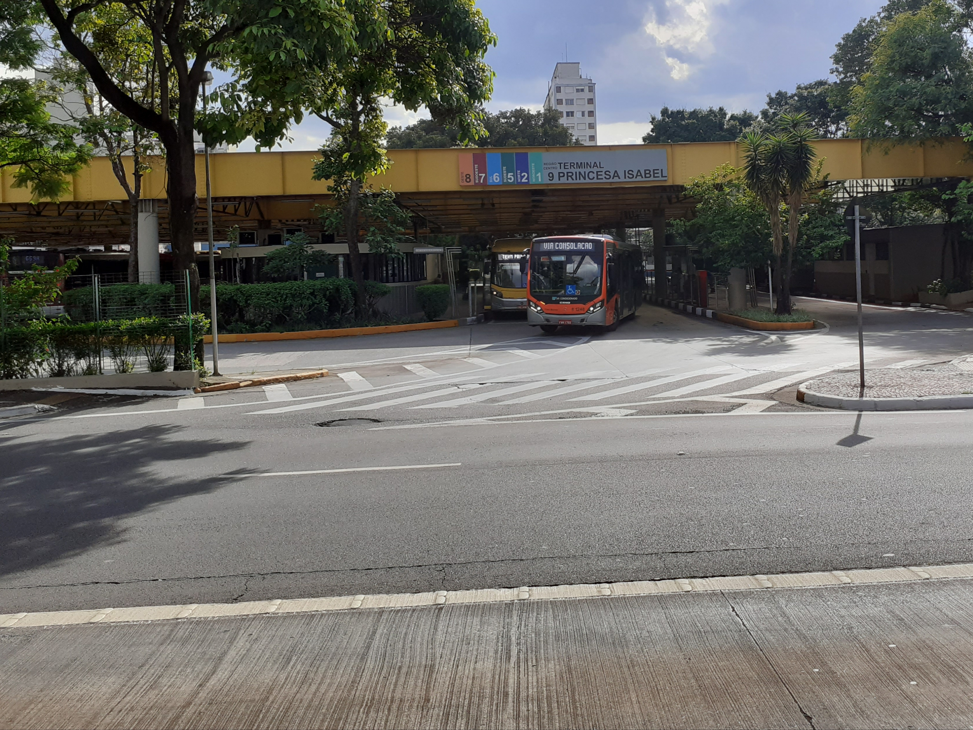 Terminal urbano de ônibus Princesa Isabel, localizado no centro da cidade de São Paulo, Brasil.